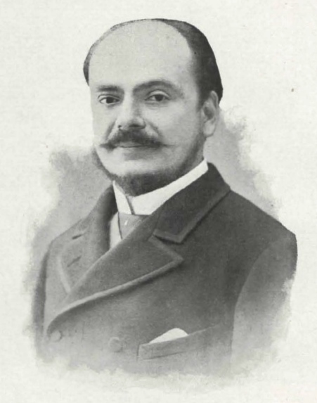 José de Cárdenas Uriarte.